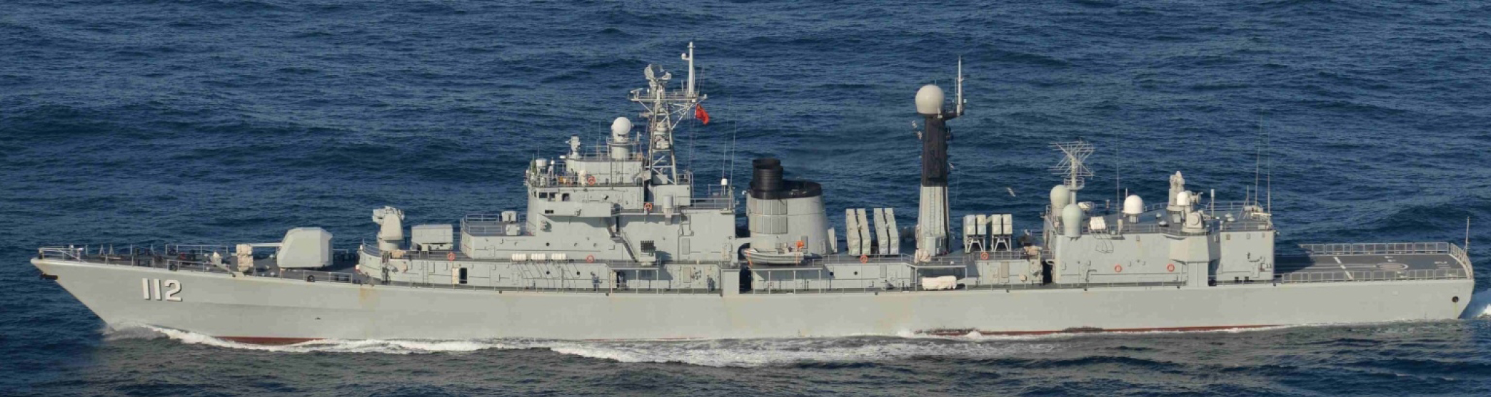 １２月２７日（土）午後２時半頃、海上自衛隊第８護衛隊「すずつき」（佐世保）及び第４航空群所属「Ｐ－３Ｃ」（厚木）が、上対馬の北東約３１０ｋｍの海域を南西進する中国海軍ルフ級駆逐艦１隻、ジャンカイⅡ級フリゲート２隻及びフチ級補給艦１隻の合計４隻を確認した。 その後、当該艦艇が対馬海峡を南下したことを確認した。 なお、これら４隻の中国艦艇は１２月４日（木）に大隅海峡を東航し、その後、西太平洋で活動、１２月２５日（木）に宗谷海峡を西航したものと同一である。